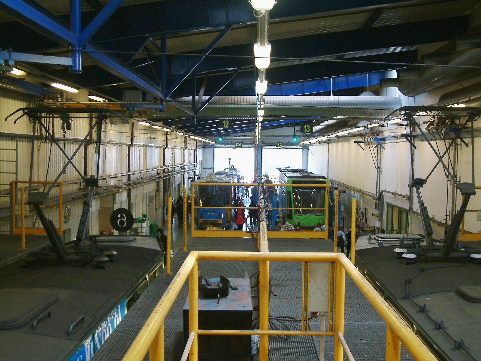 Głogowska Depot, Poznań